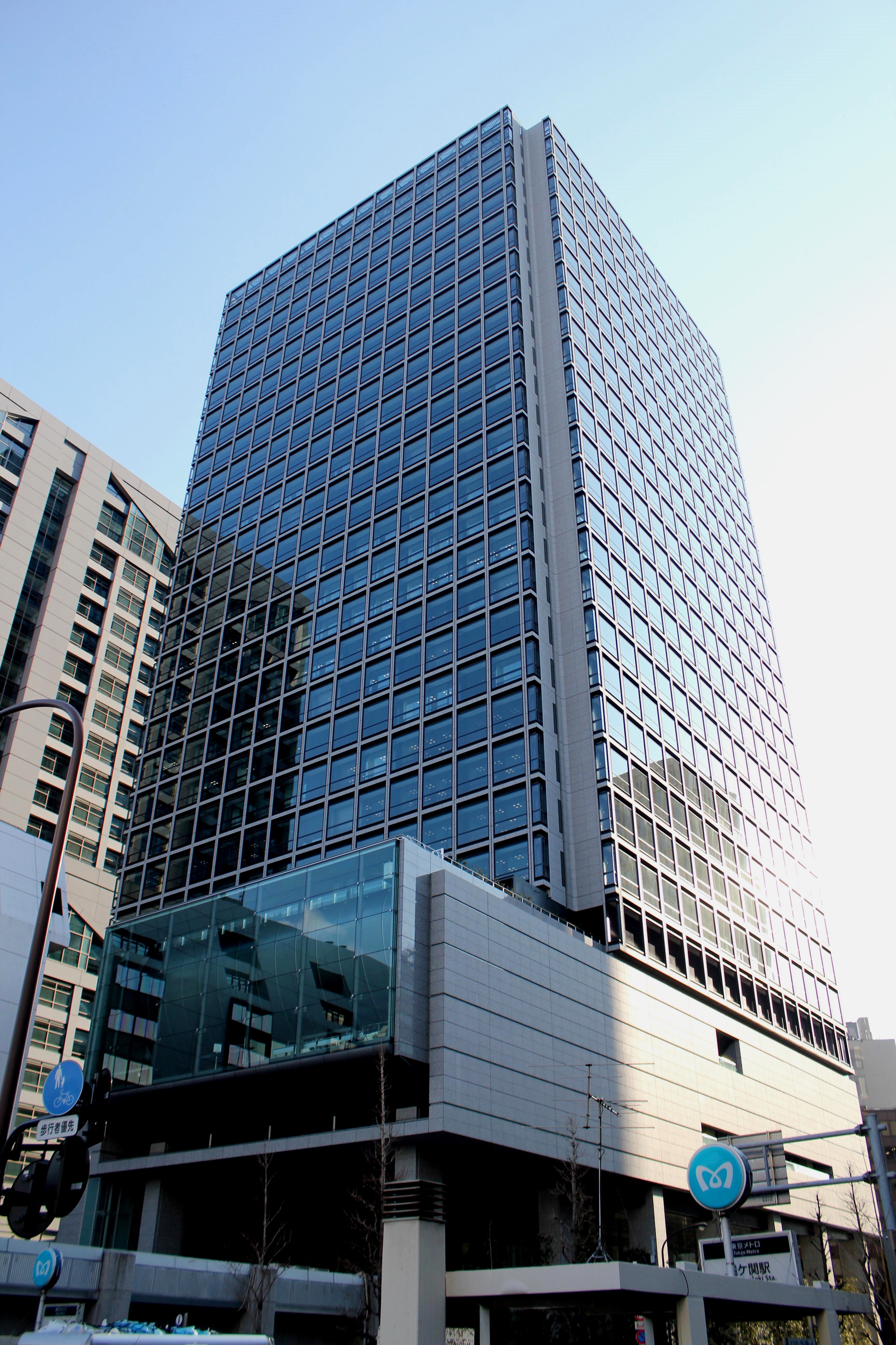 双日㈱会社がオフィスをかまえる飯野ビルディング